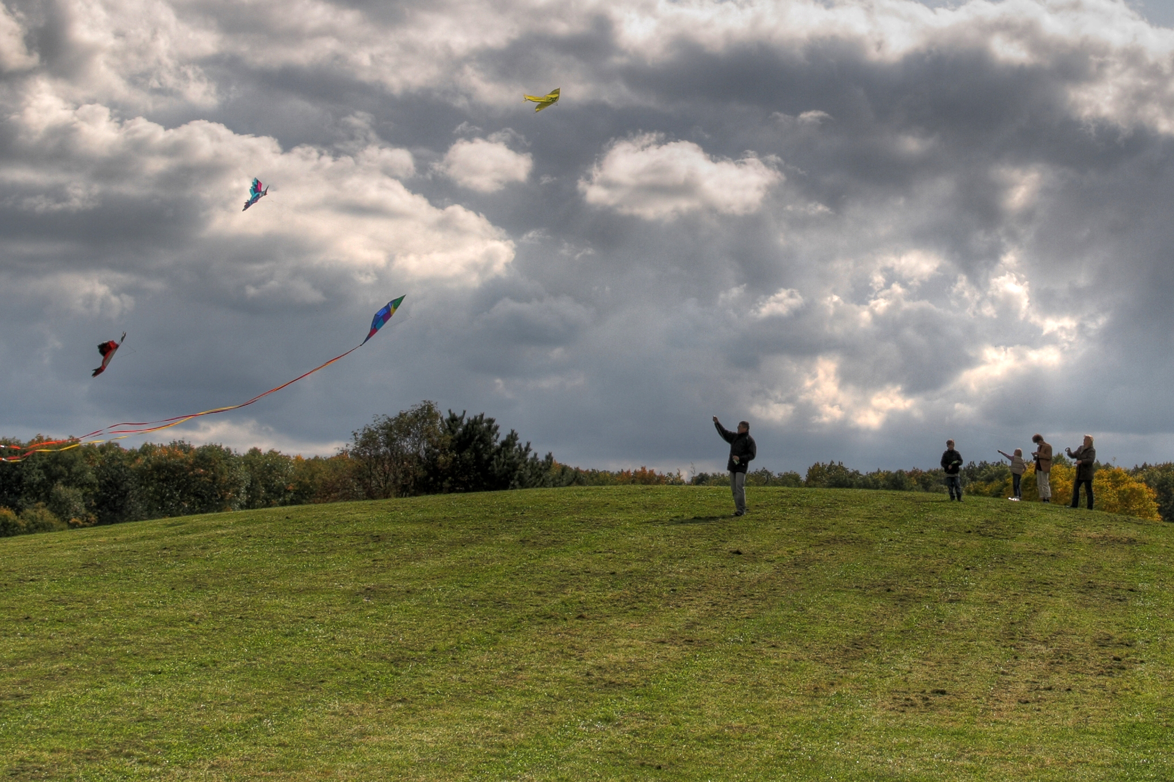 Drachensteigen im Friedenswald, Köln-Rodenkirchen